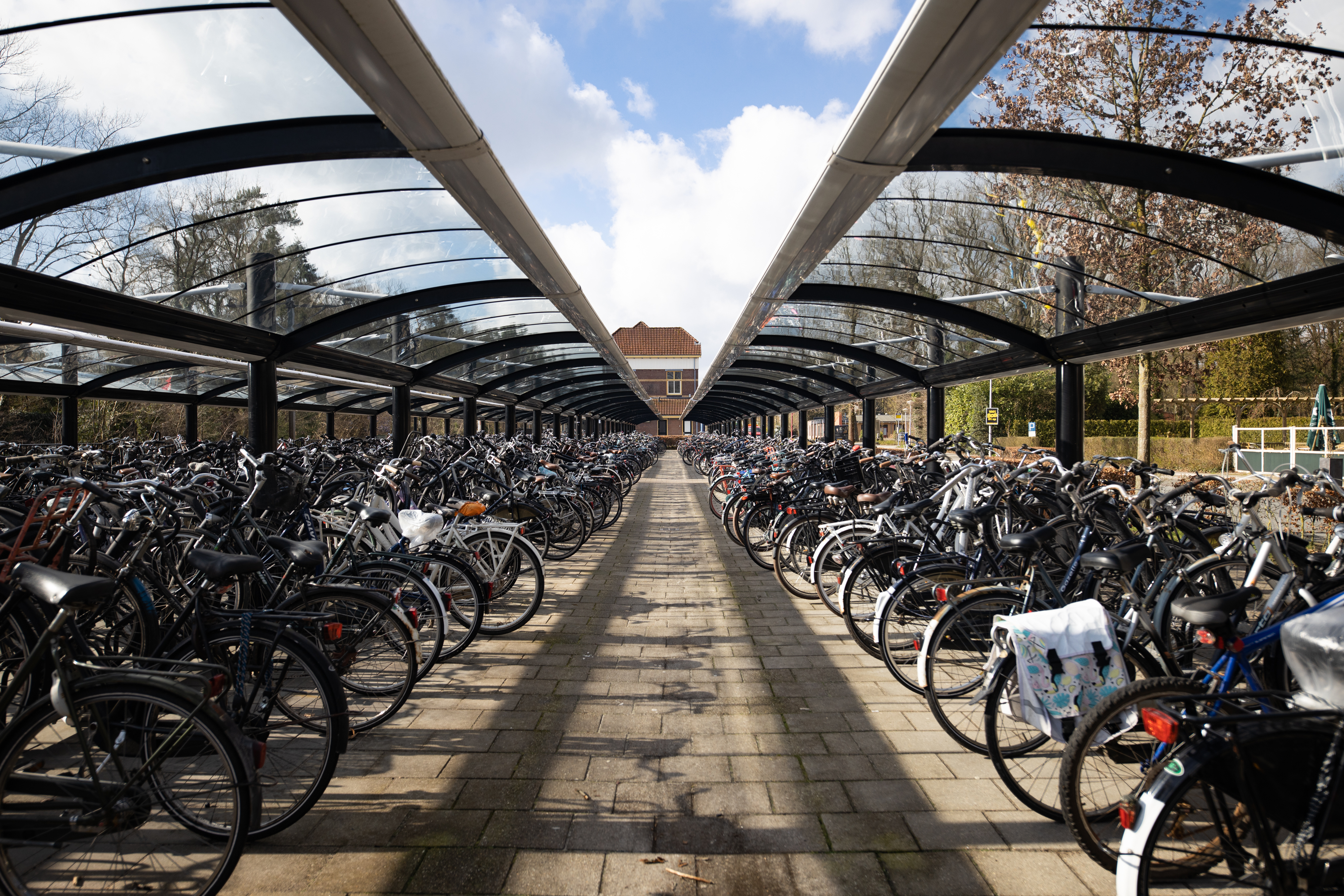 Fietsenstalling bij Station Ommen in 2020